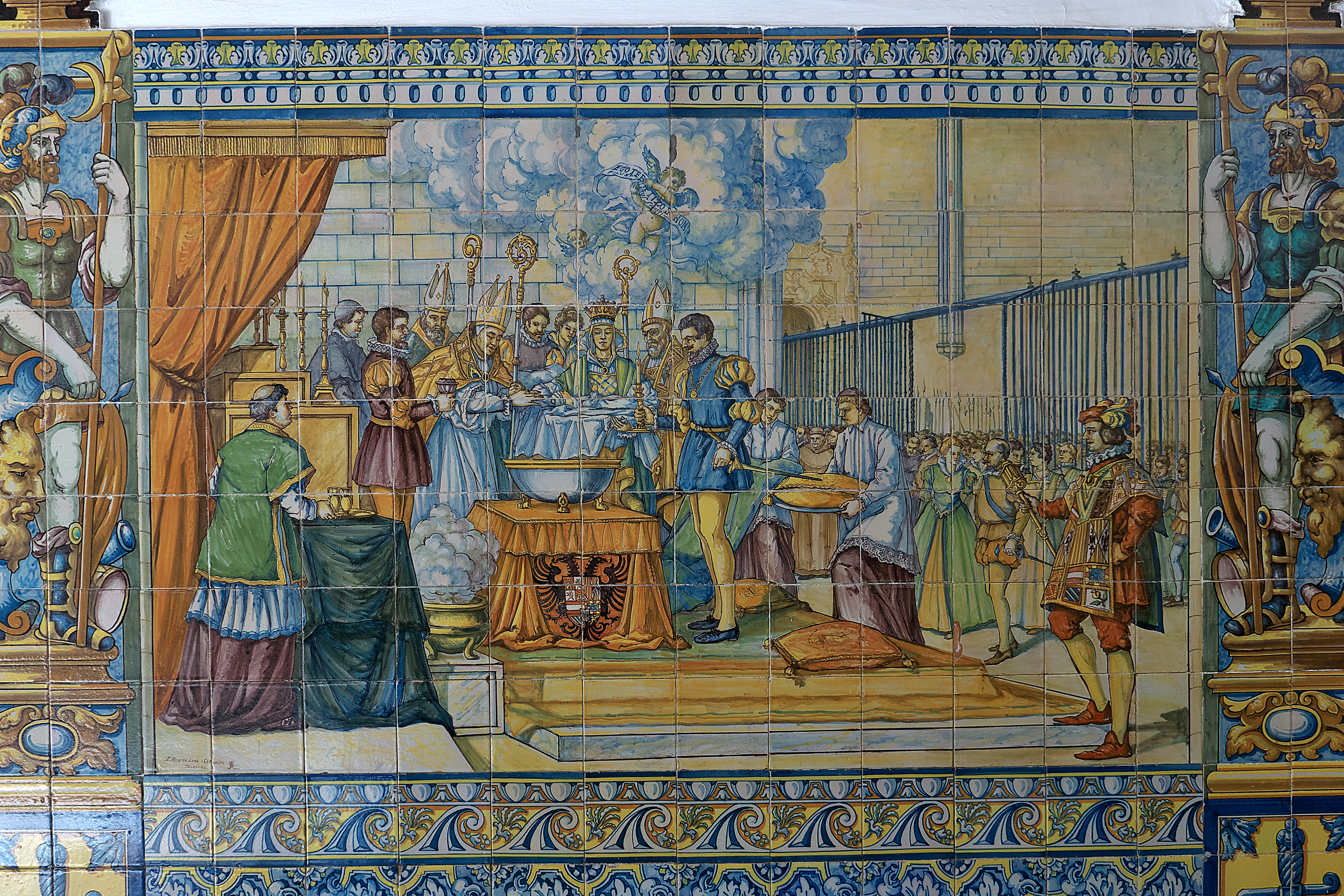 Juan Ruiz de Luna (1939), siguiendo dibujo de Valentín Carderera y Solano (1837), realiza el azulejo Bautizo de Felipe II para el Palacio de Pimentel.